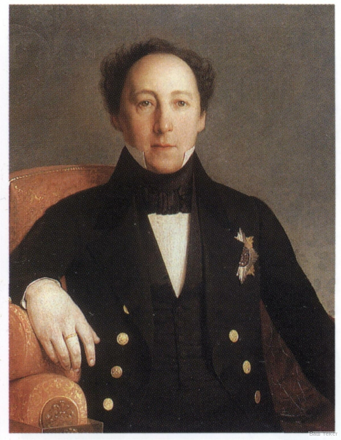 Портрет почт-директора Федора Ивановича Прянишникова